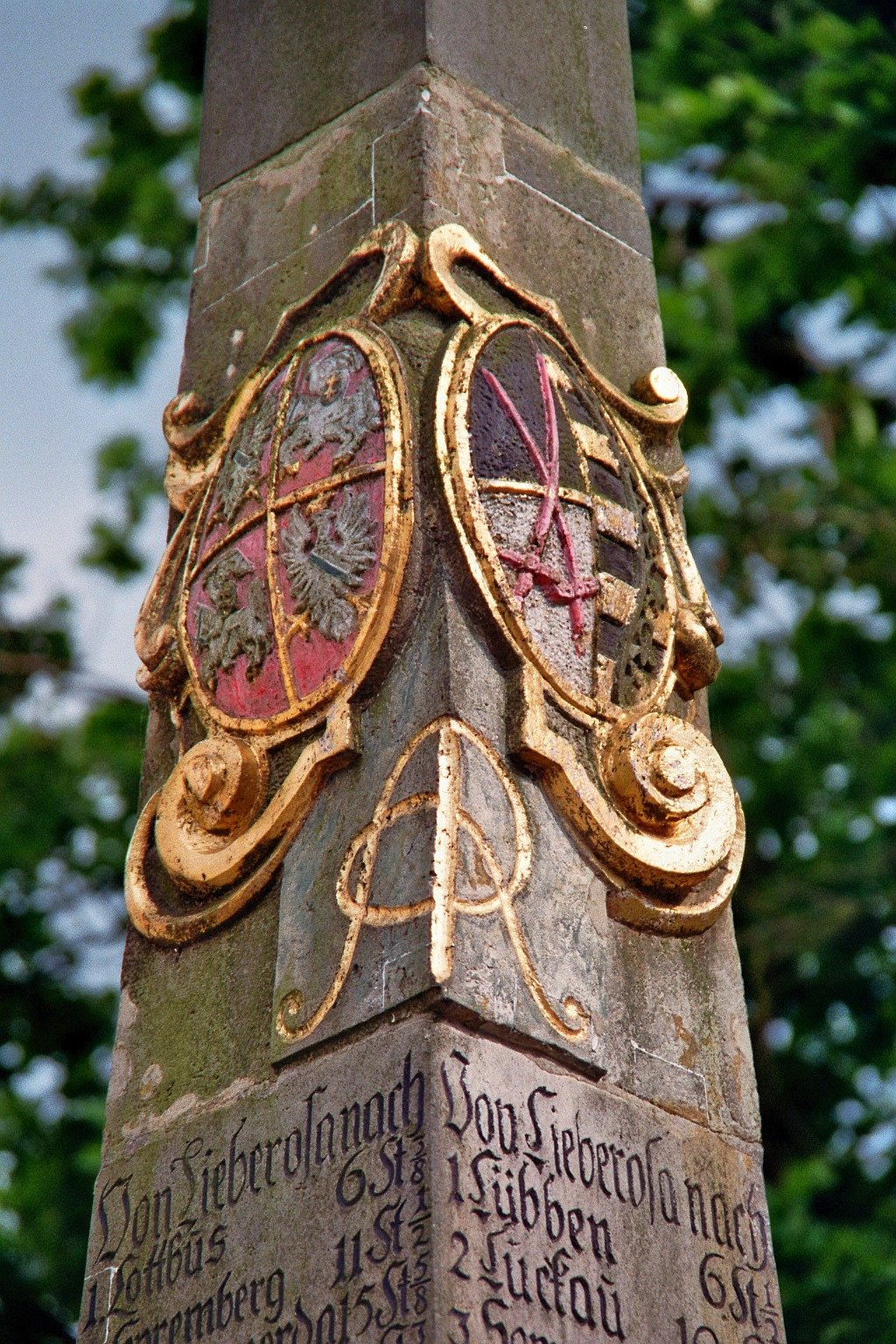 Kursächsische Postmeilensäule am Heinz-Bergner-Platz in Lieberose, Landkreis Dahme-Spreewald, Brandenburg, Deutschland.